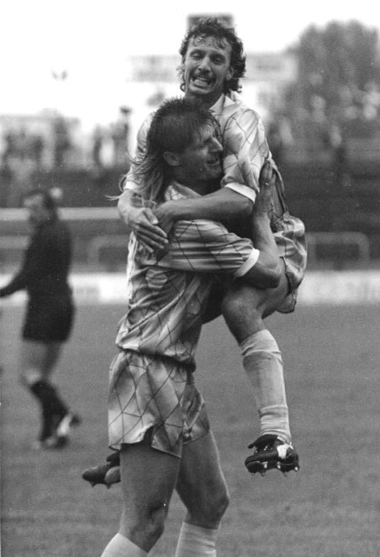 ADN-Bernd Settnik-5.9.90-Berlin: Oberliga- 1. FC Berlin - 1. FC Hansa Rostock 0:3 (0:3) Jubel bei Volker Röhrich und Hilmar Weilandt (oben) nach dem 2:0 für die Hanseaten in der 26. Minute durch Röhrich. Mit klaren Sieg übernahm Rostock die Tabellenspitze.